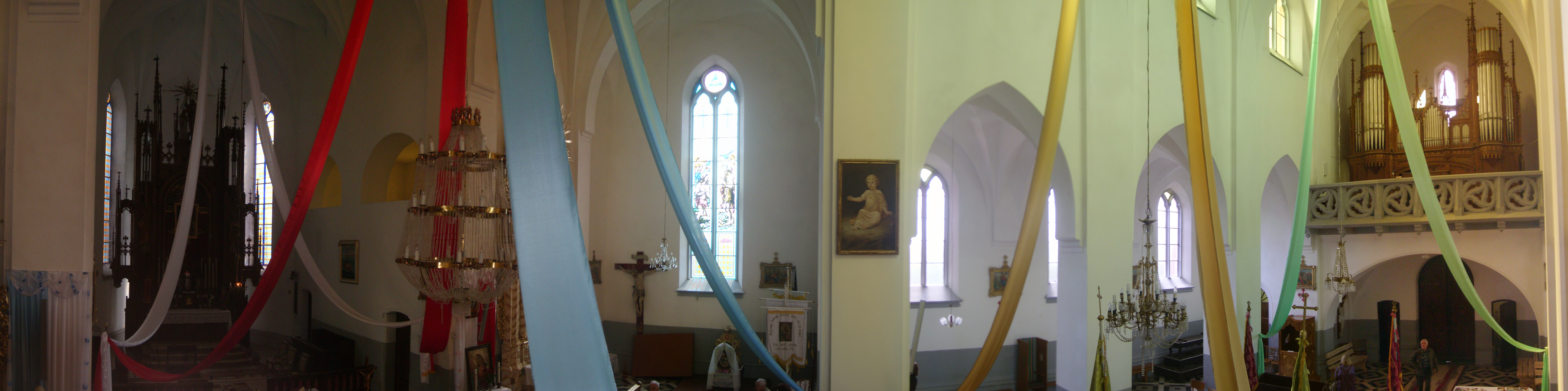 Беларуская (тарашкевіца): Касьцёл Яна Хрысьціцелядэкаратыўнае аздабленьне інтэр’еру:бакавы алтар,хрысьцільня ў правым нефе. в. Мсьцібава This is a photo of Belarusian heritage monument. Reference number: 412Г000110 ( WLM)